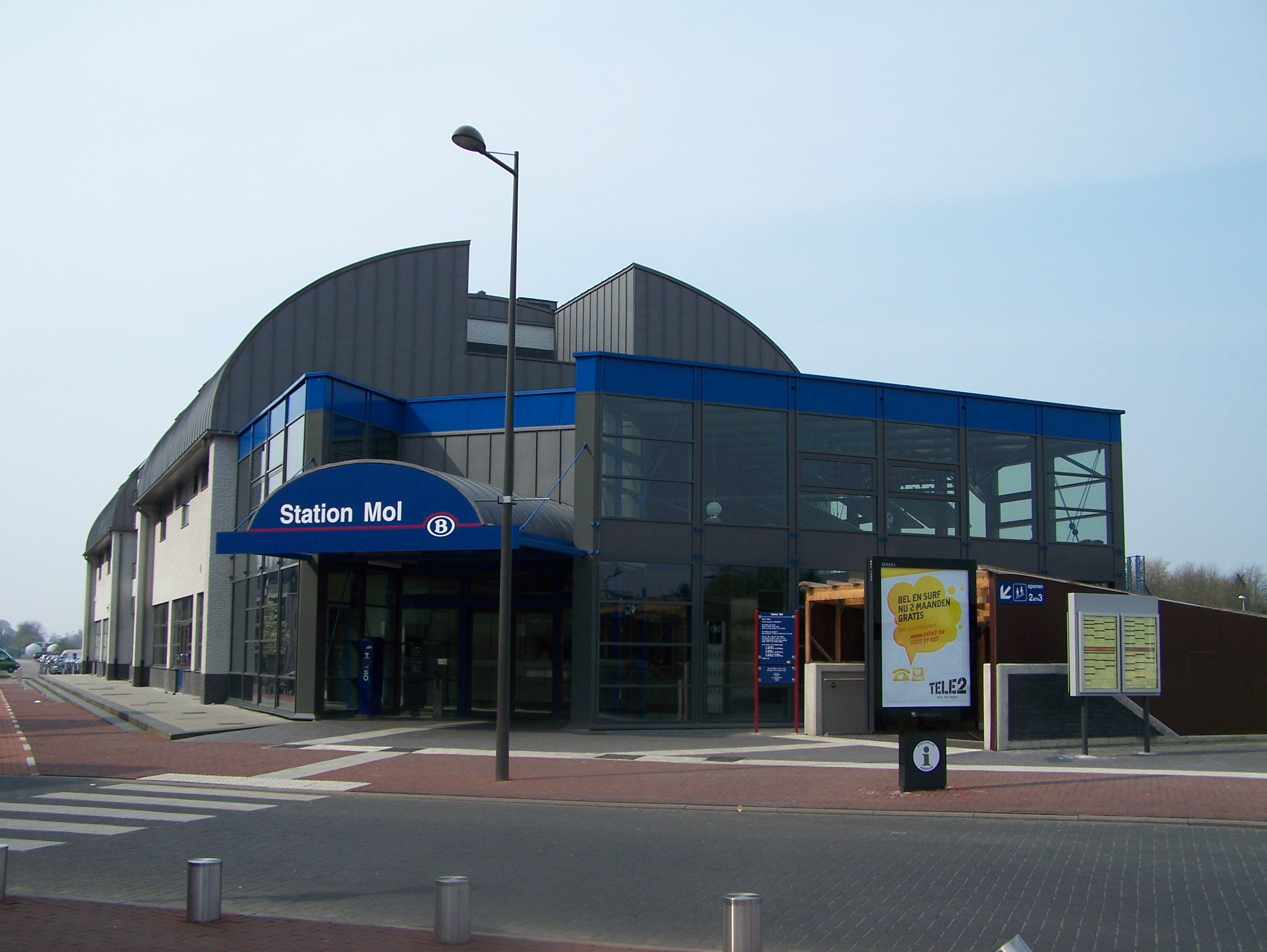 nieuwe stationsgebouw mol